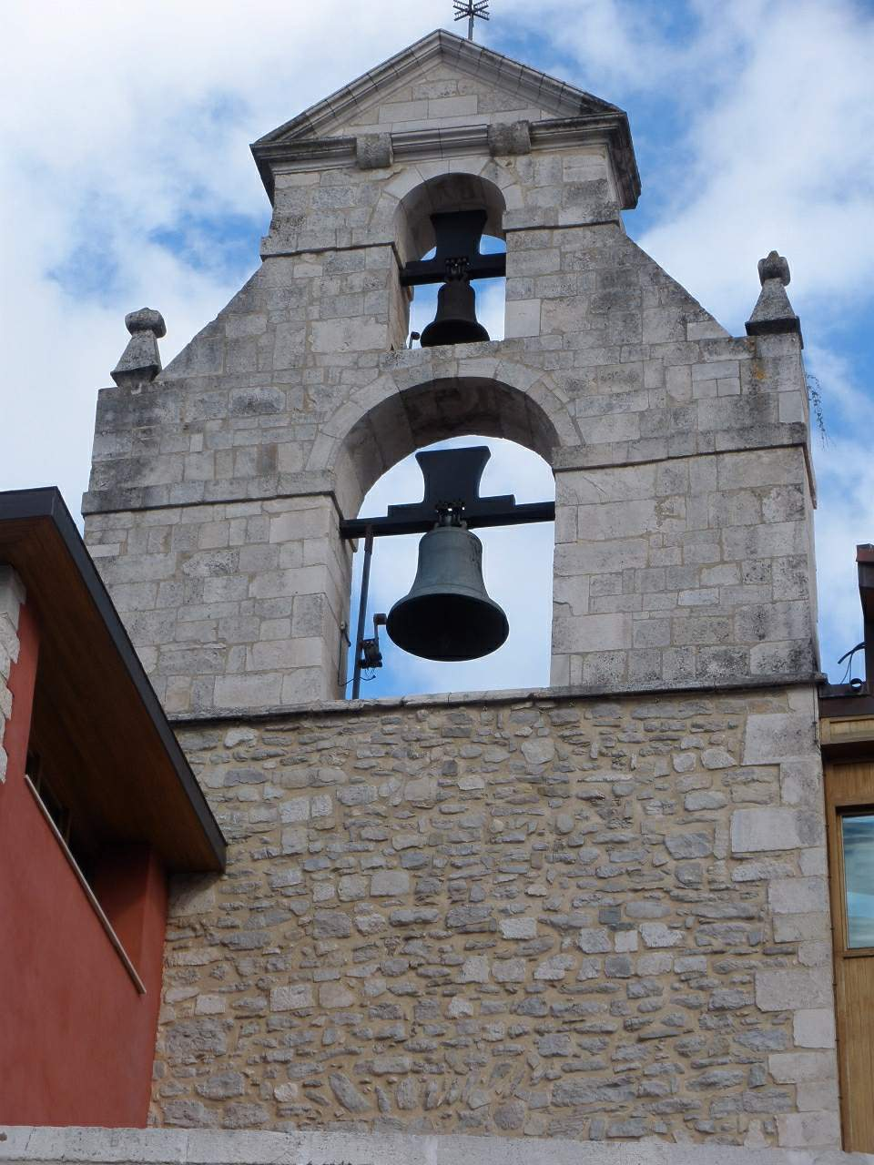 Ayuntamiento y antigua iglesia de San Martín, en Salvatierra-Agurain (Álava)